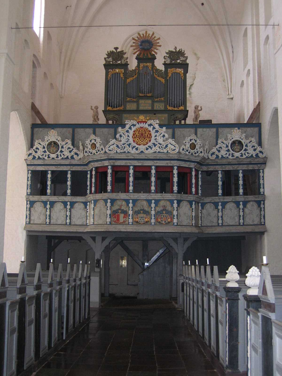 Organ of Børglum kloster